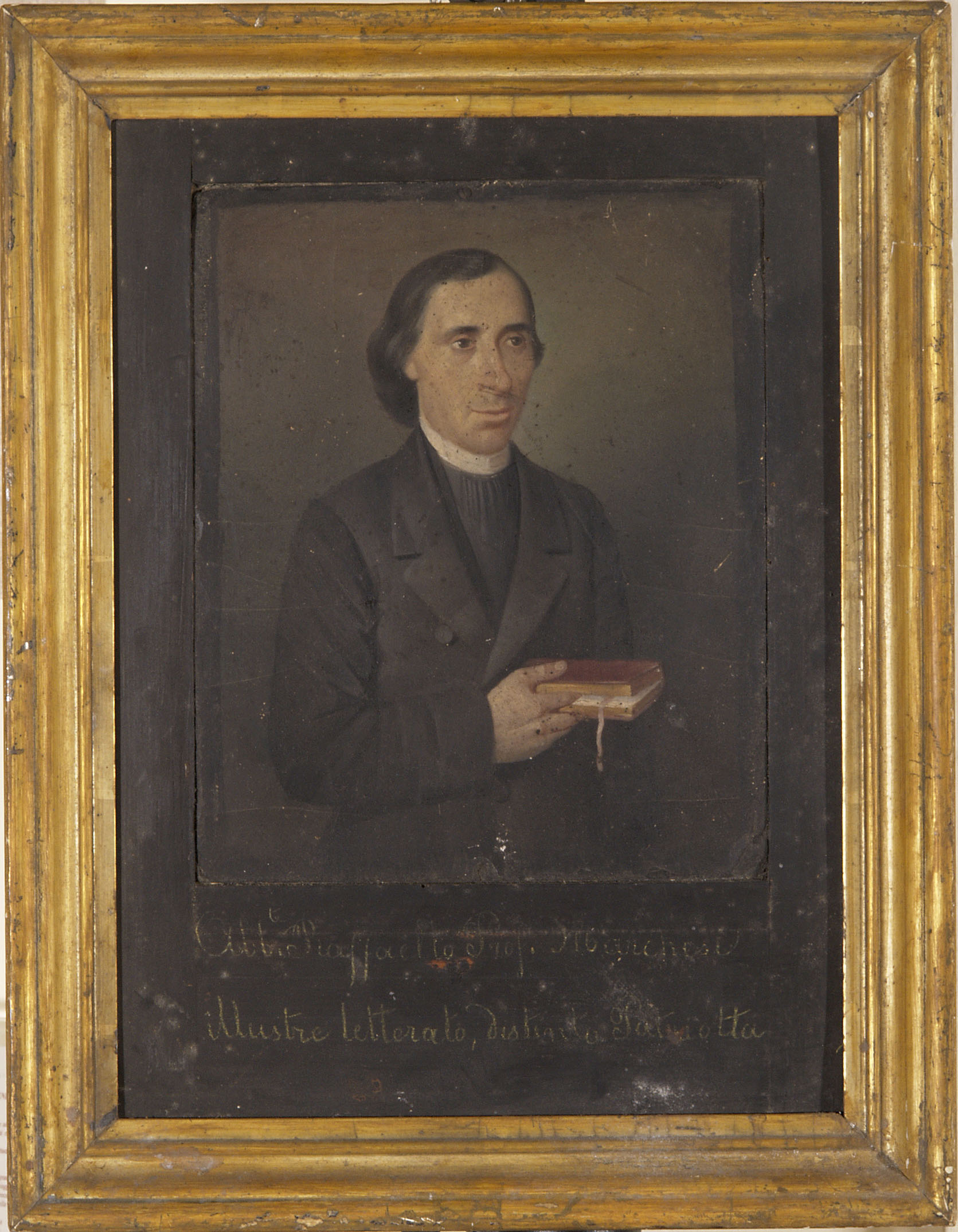 Biblioteca comunale Augusta, l’abate Raffaele Marchesi (ritratto in olio su legno, di pittore ignoto, conservato alla Biblioteca comunale Augusta di Perugia)